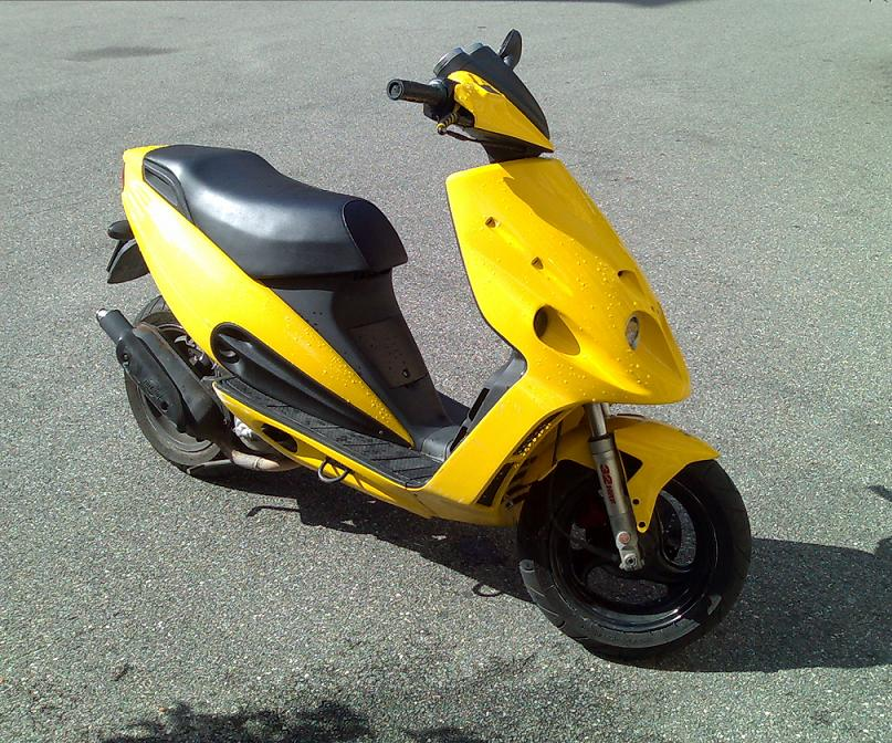 Michele Lupoli